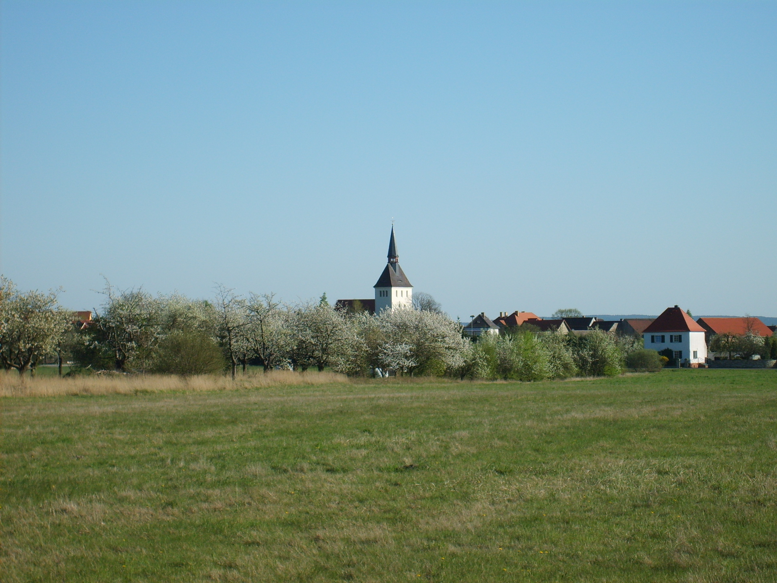 Hohenleipisch zur Kirsch-Blüte